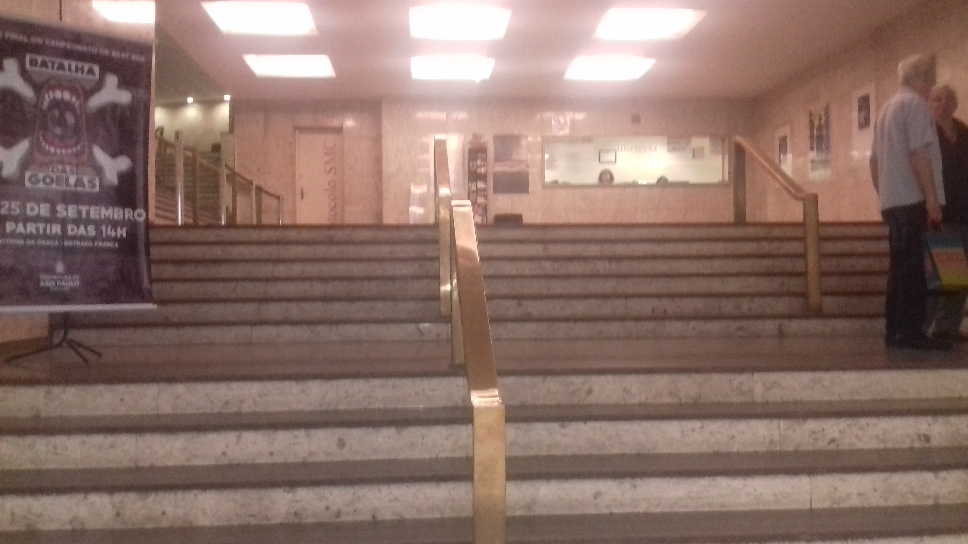 Escadaria da entrada do Cinema Olido.